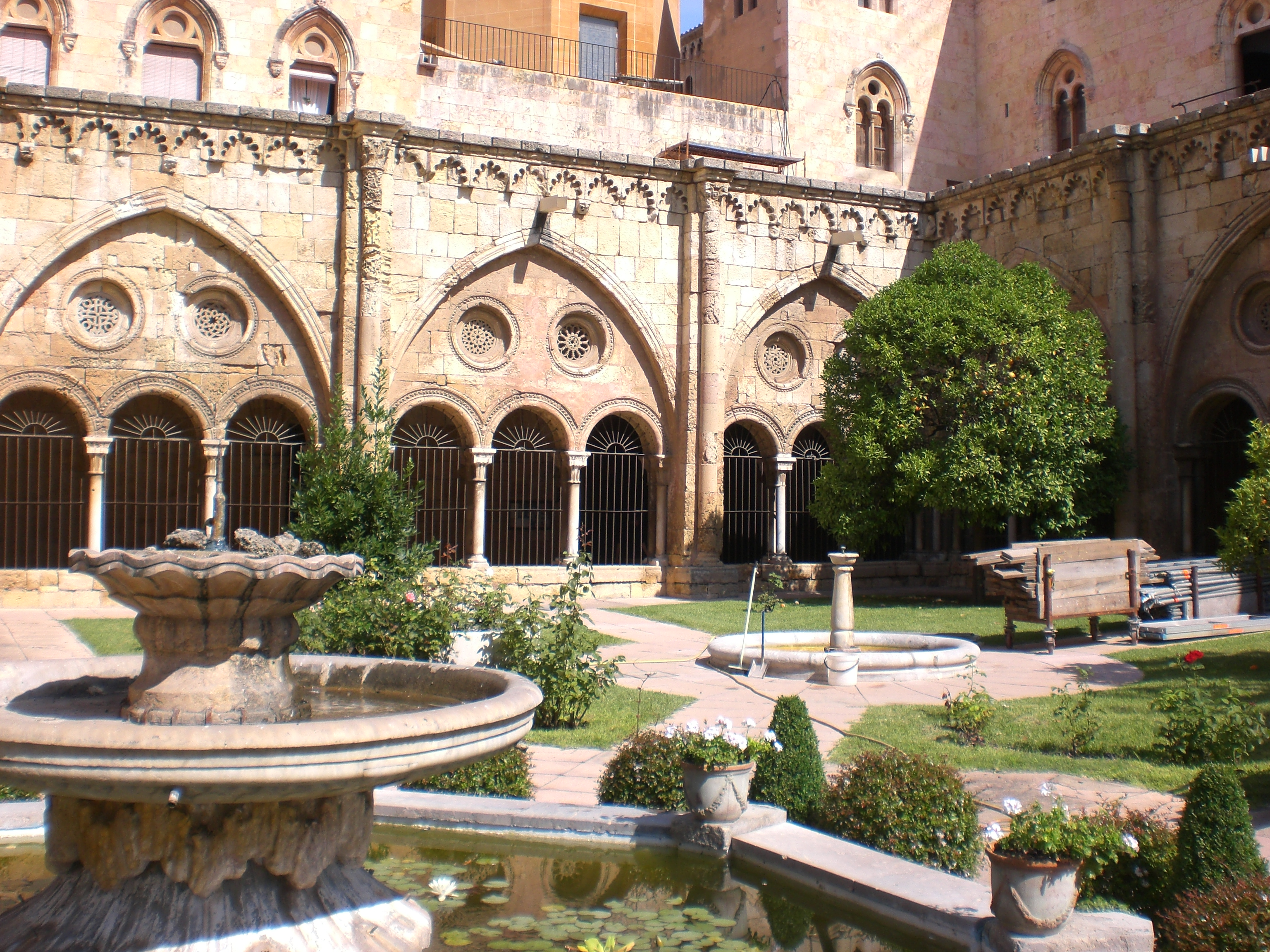 Chiostro interno della Cattedrale di Tarragona (Spagna).